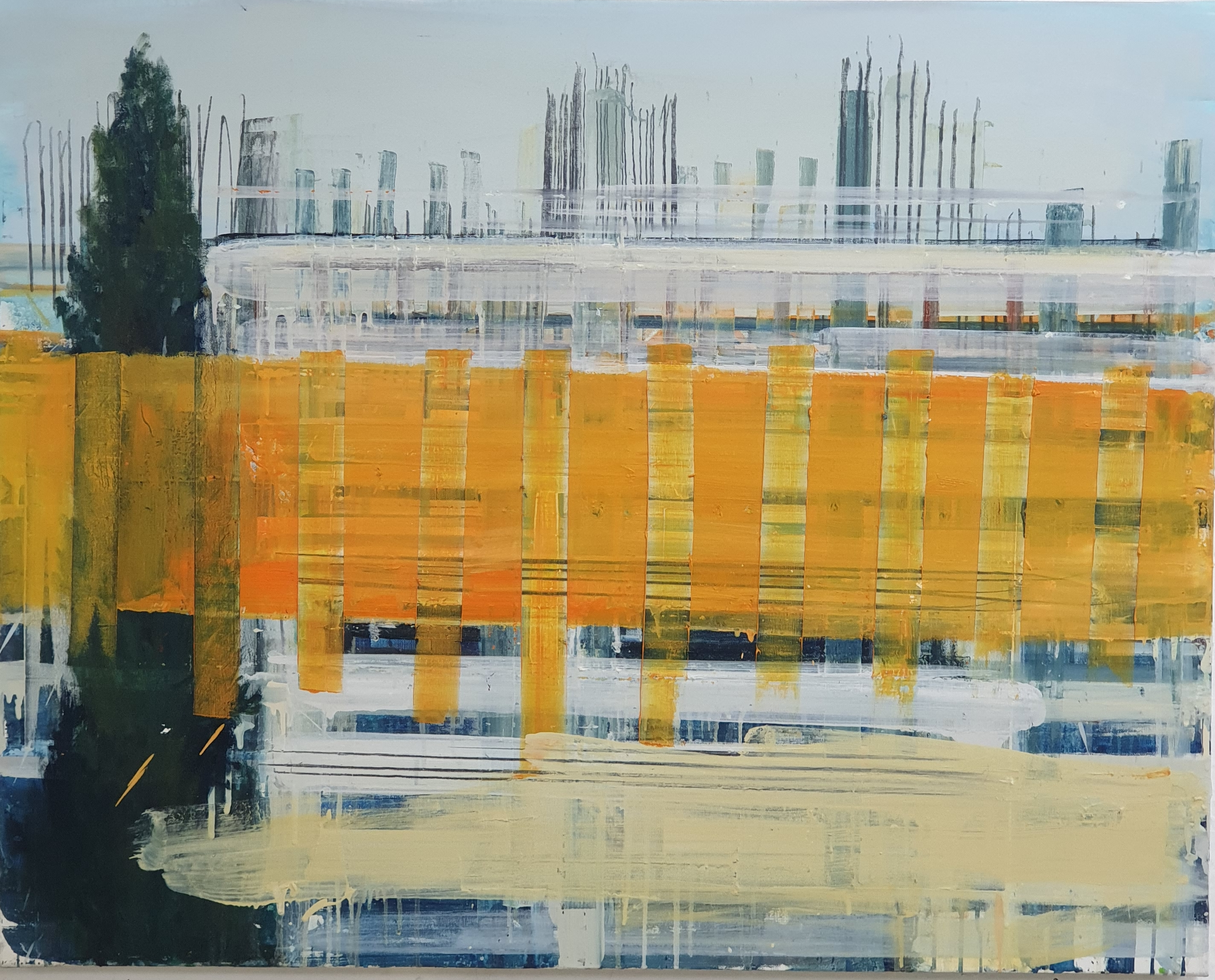 ציור של עופרי מרום.